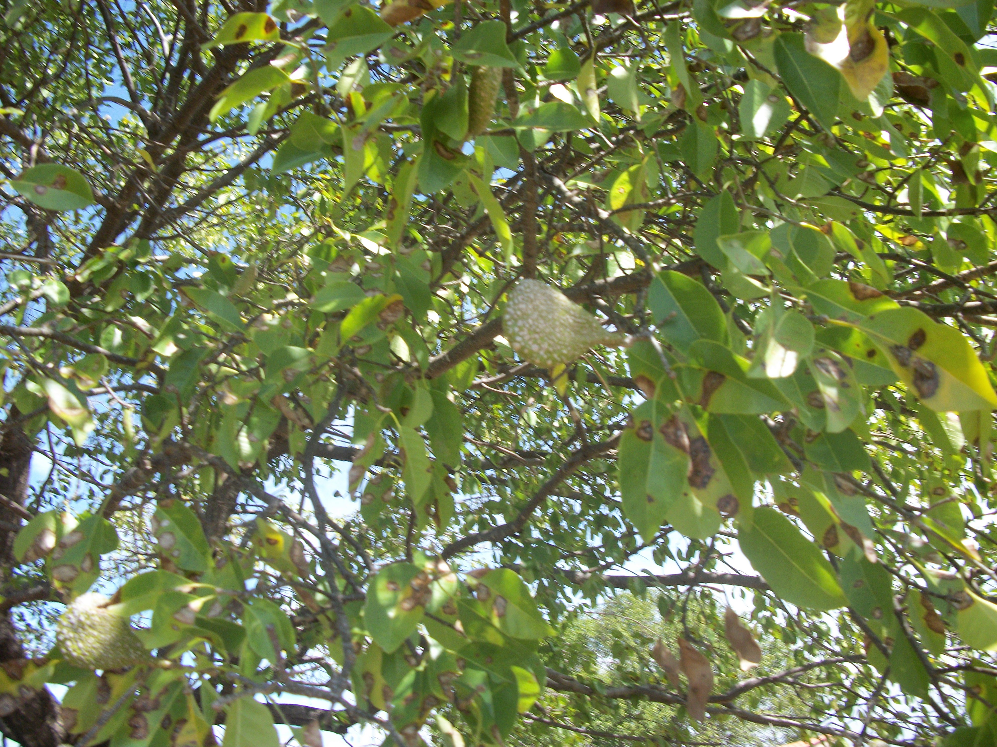 Frutificação em pereiros